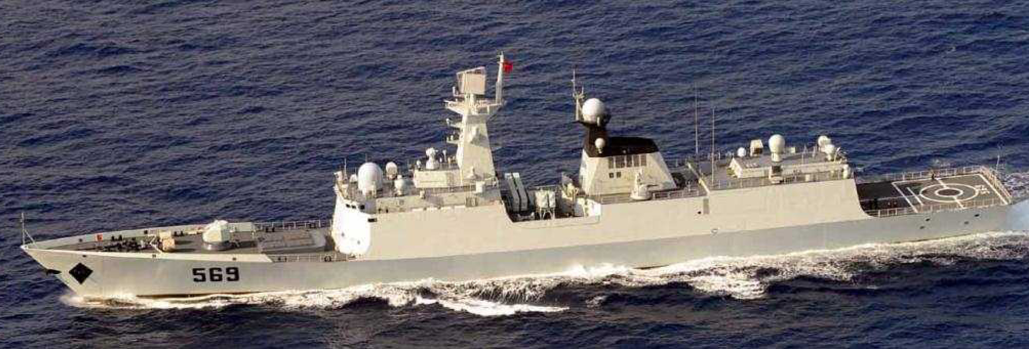 ５月６日（日）午前６時頃、海上自衛隊第５航空群（那覇）所属「Ｐ－３Ｃ」が、沖縄本島の南西約６５０ｋｍの海域を太平洋に向けて南東進する中国海軍のルーヤンⅠ級ミサイル駆逐艦２隻、ジャンカイⅡ級フリゲート２隻及びユージャオ級揚陸艦１隻の合計５隻を確認した。このうち、ルーヤンⅠ級ミサイル駆逐艦及びユージャオ級揚陸艦は、海上自衛隊において初めて確認したものである。また、沖縄本島南西約６１０ｋｍの海域において艦載ヘリコプターの飛行及び陣形運動を行っていたことが確認されている。